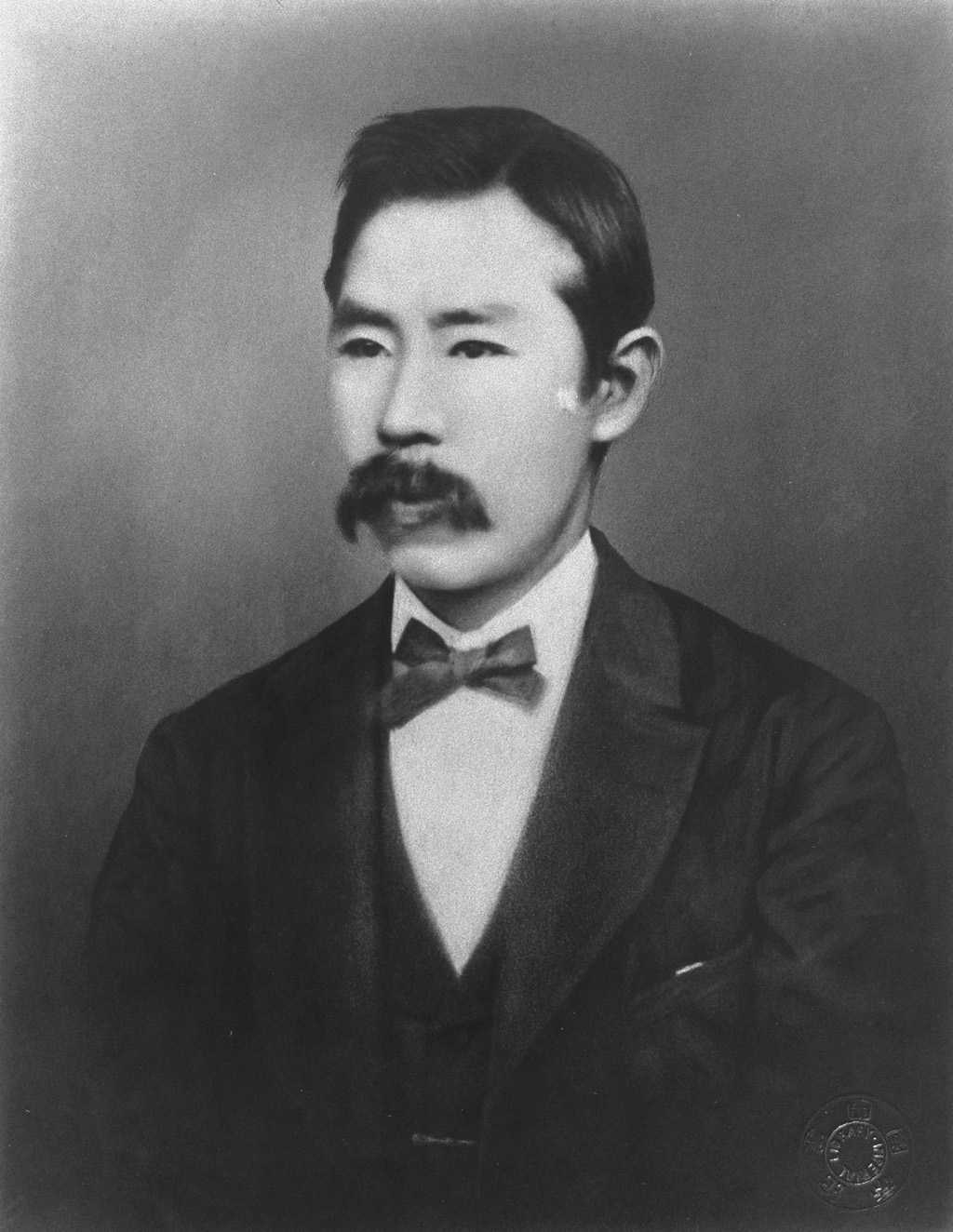 Portrait of Niijima Jo (新島襄, 1843 – 1890)